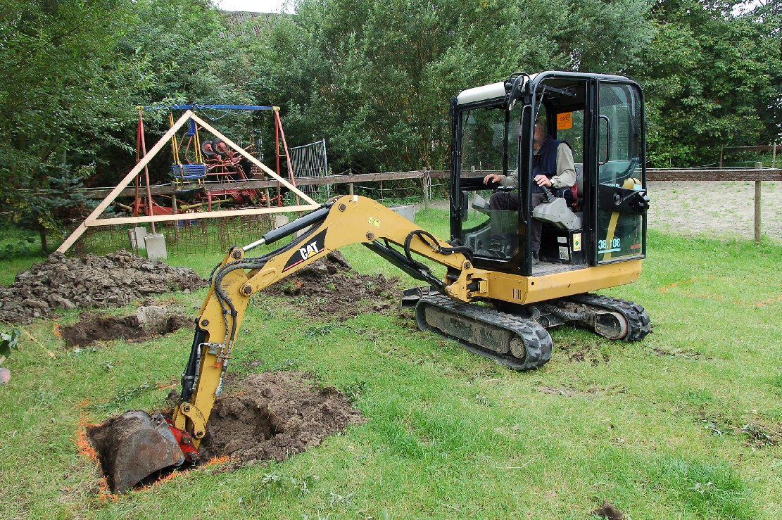 ein Minibagger bei der Arbeit Durch die Übernahme der UMTS Kosten durch den gemeinnützigen Vereins Skillshare.eu konnte dieses Bild bereitstellen werden. Skillshare e.V. ist ein eingetragener gemeinnütziger Verein zur Förderung der Bildung durch Unterstützung der Erstellung, Sammlung und Verbreitung so genannten freien Wissens. IBAN: DE16 8306 5408 0004 8850 66 BIC: GENODEF1SLR Bank: VR-Bank Altenburger Land